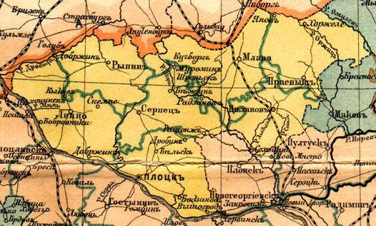 Плоцская губерния в 1896 году